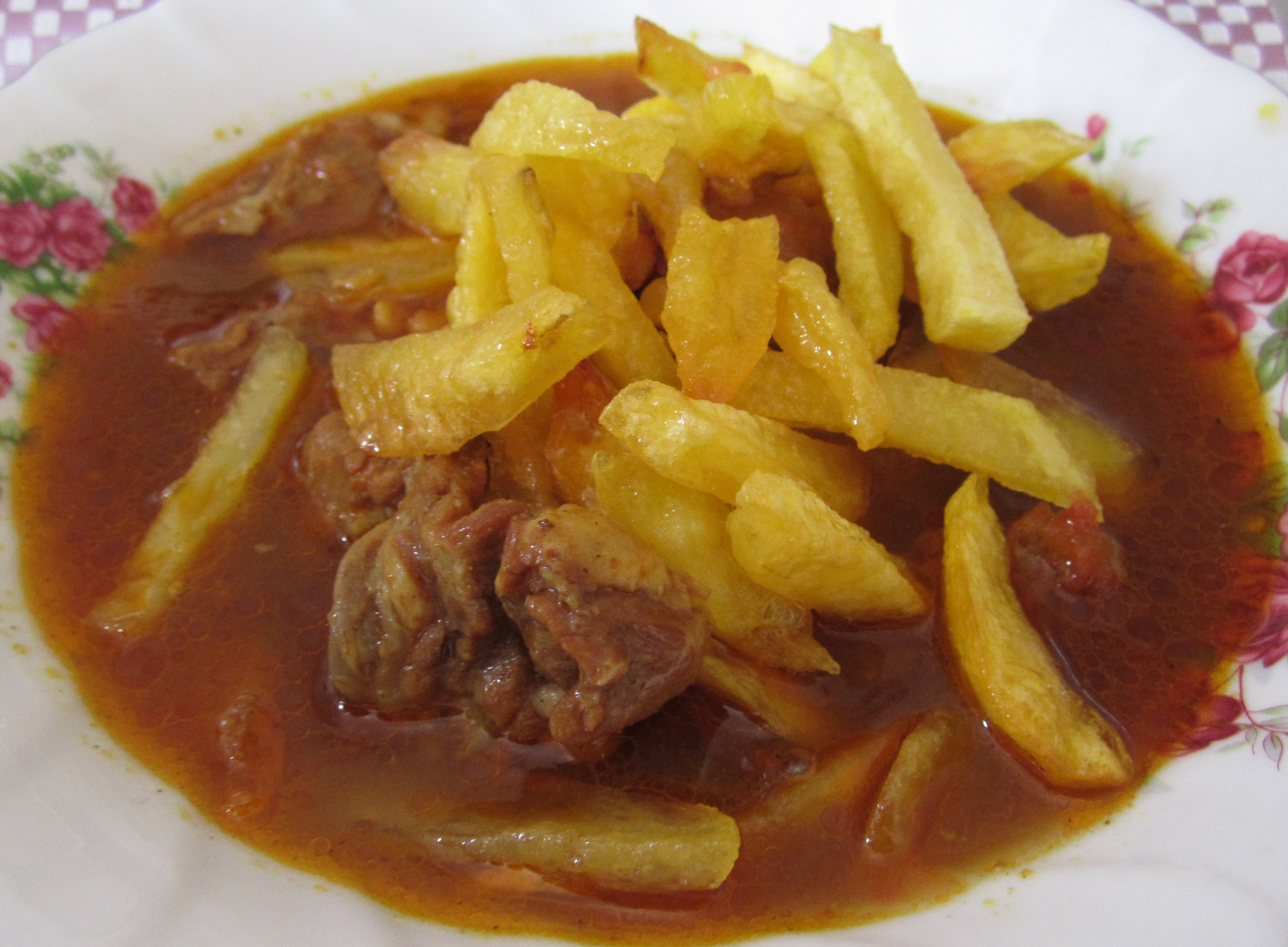 خورش قیمه